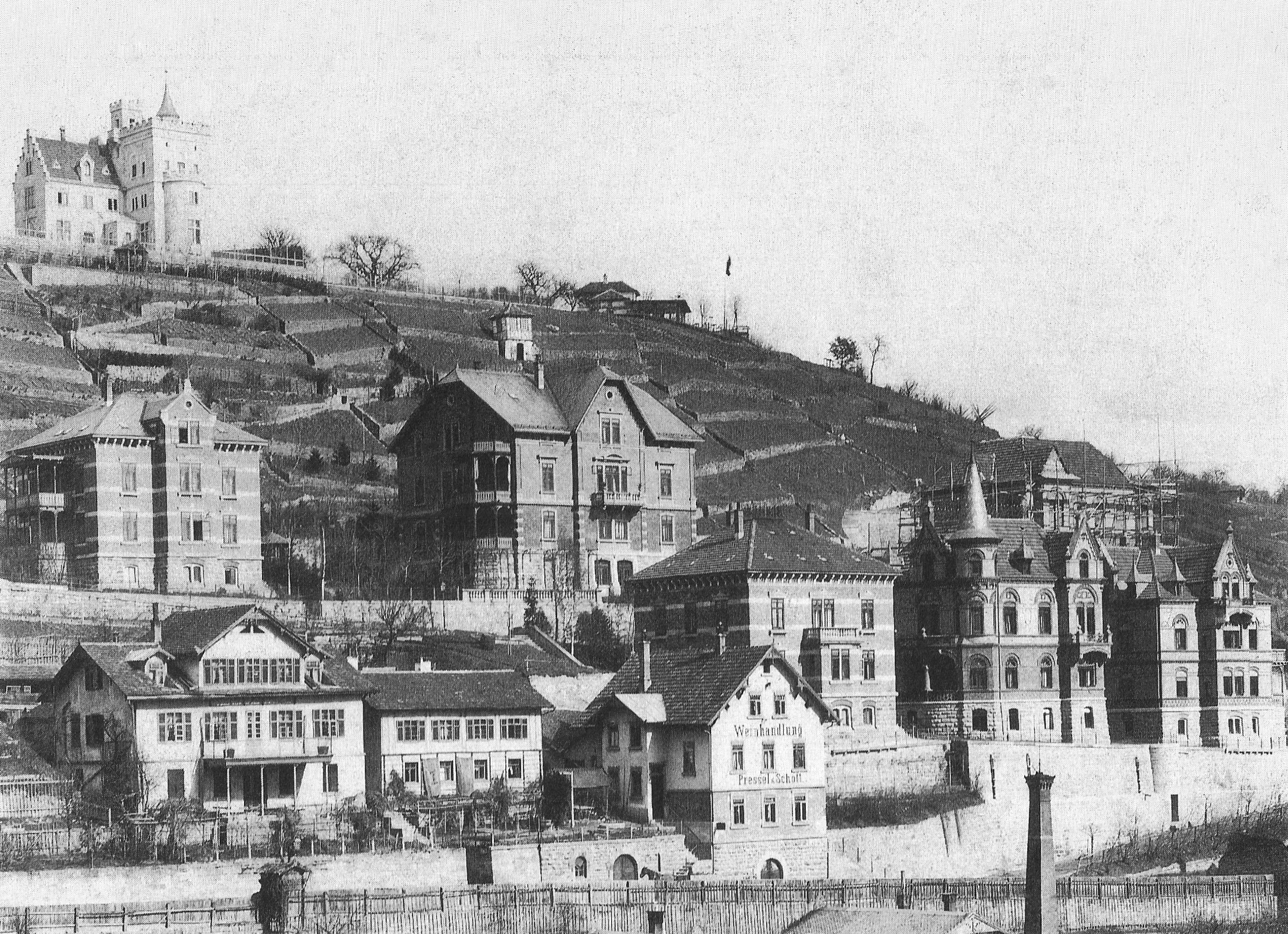 Tübingen. Gartenstraße 13 und Olgastraße. Vorne links das ehemalige Wohnhaus von Karl Marcell Heigelin (Gartenstraße 13/1), das seit 1872 dem Rittmeister, Kommandanten der Tübinger Stadtgarde und Bierbrauer Carl Heinrich Schott (1824–1902) gehörte, der mehrere Veränderungen daran vornehmen ließ. Auf dem Grundstück entstand 1881 ein weiteres Wohnhaus (weiter rechts, Gartenstraße 13), das seinem Schwiegersohn, dem Kaufmann Gustav Pressel (1849–1899) gehörte, der dort seine Weinhandlung unter dem Schild Pressel & Schott betrieb. Darüber stehen die von der Tübinger Firma Clemens & Decker erbauten Backsteinhäuser der Olgastraße. Auf dem Österberg links das Rhenania-Haus und rechts die Ausflugsgaststätte „Sennhütte“. Ganz unten das Dach und der Schornstein der Badeanstalt von Julius Haller.